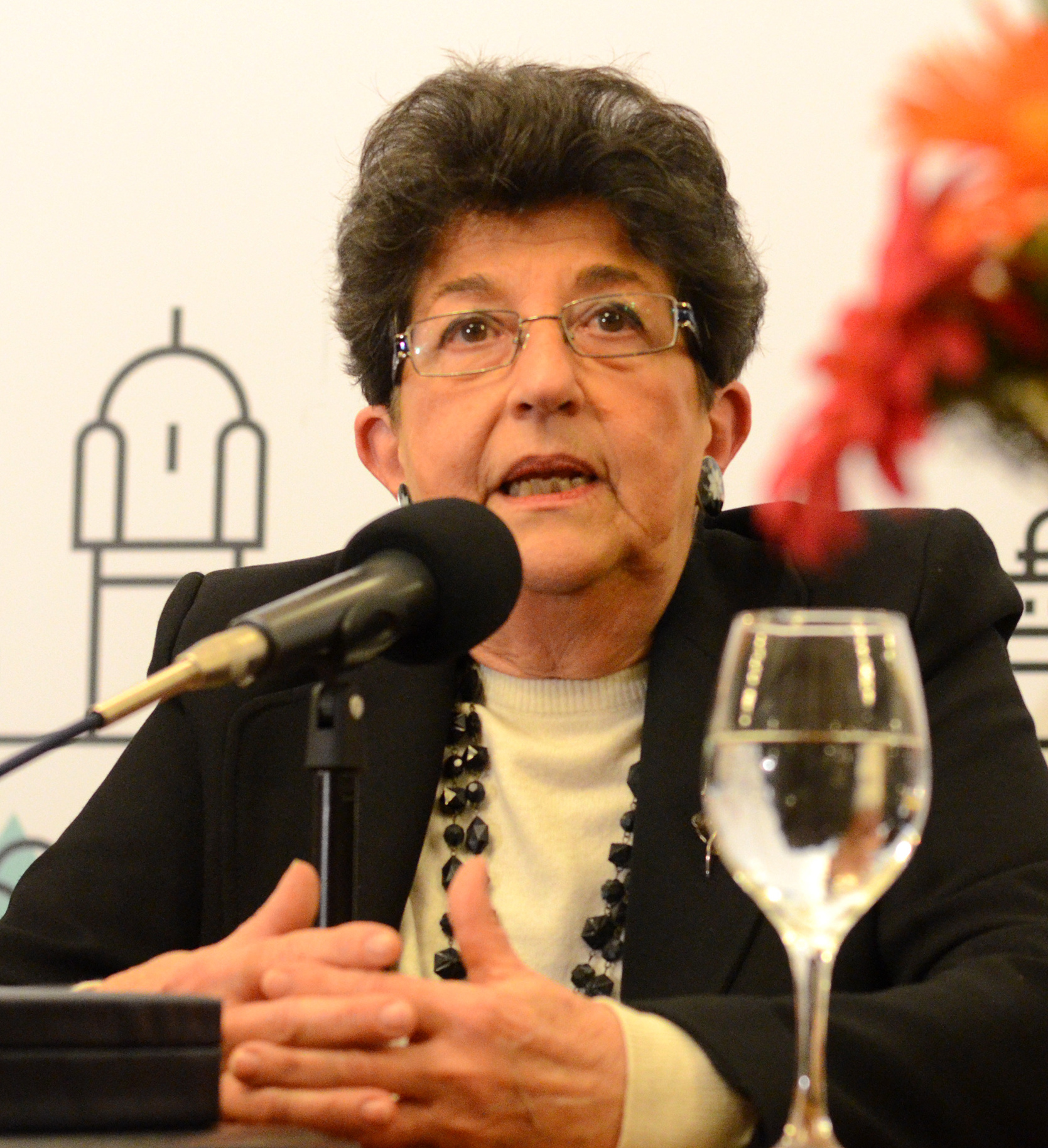 Margarita Percovich en 2016, durante el acto en el que fue declarada Ciudadana Ilustre de Montevideo.